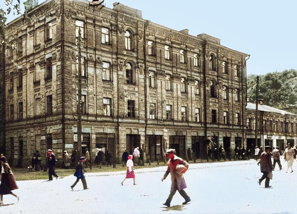 Садиба міська, Київ, Хорива вул., 2